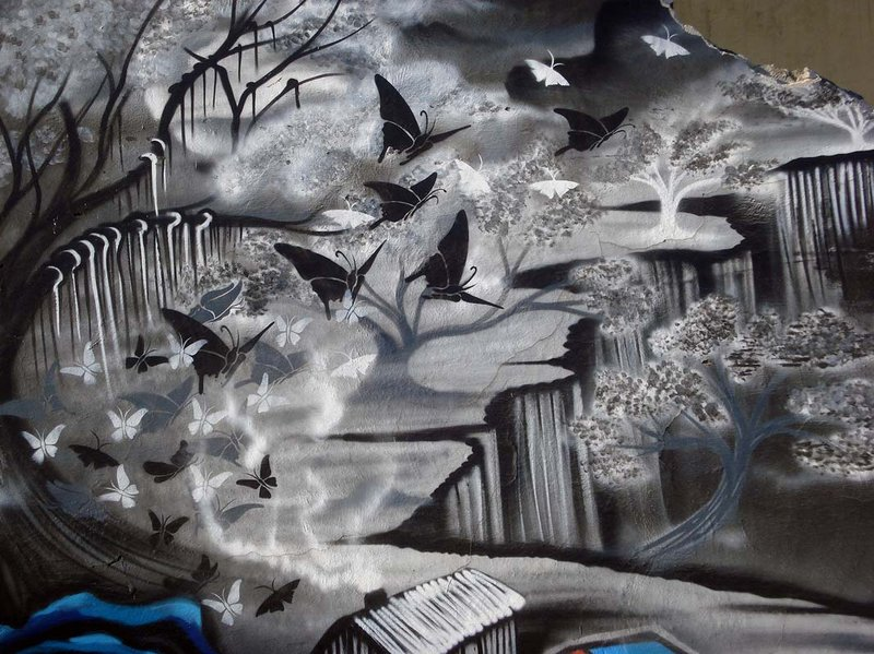 Graffiti anônimo em Porto Alegre, Brasil.